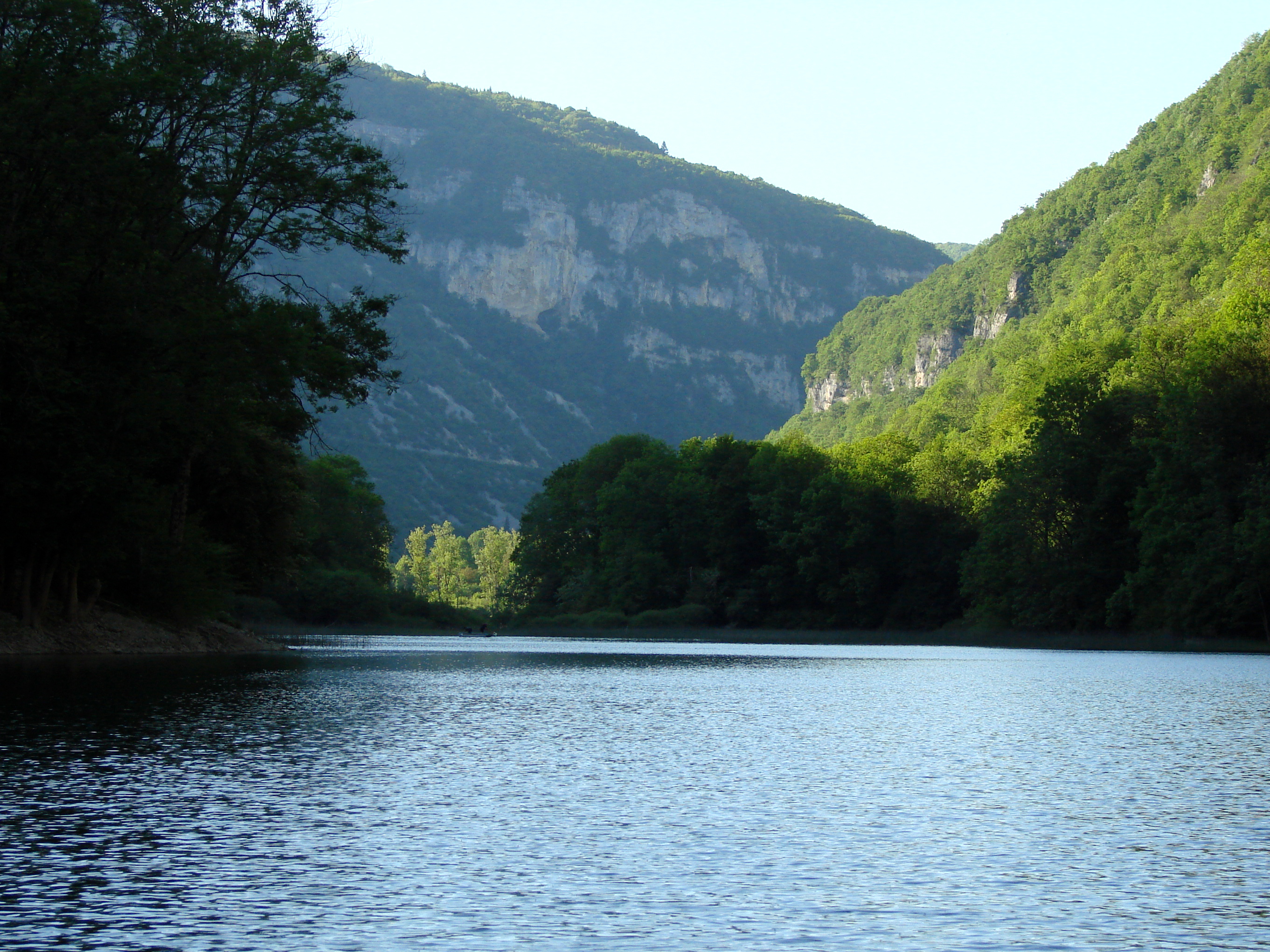 Lac des Hôpitaux